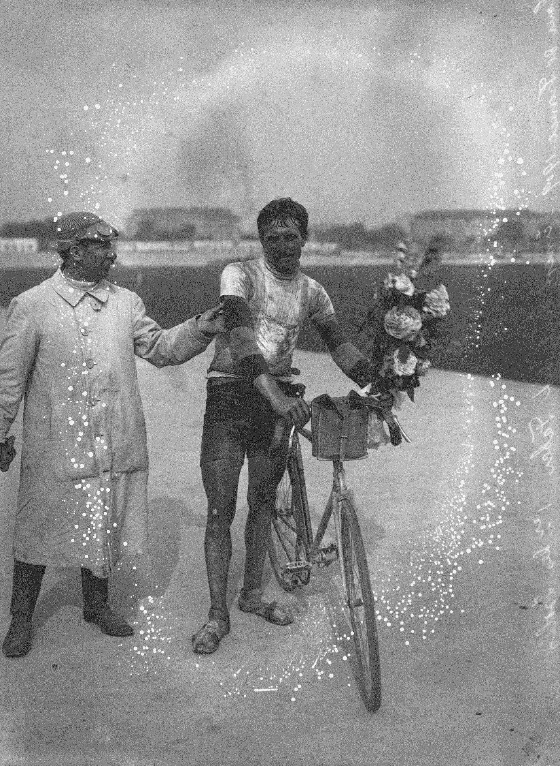 Ernest Paul à l'arrivée du Tour de France 1909